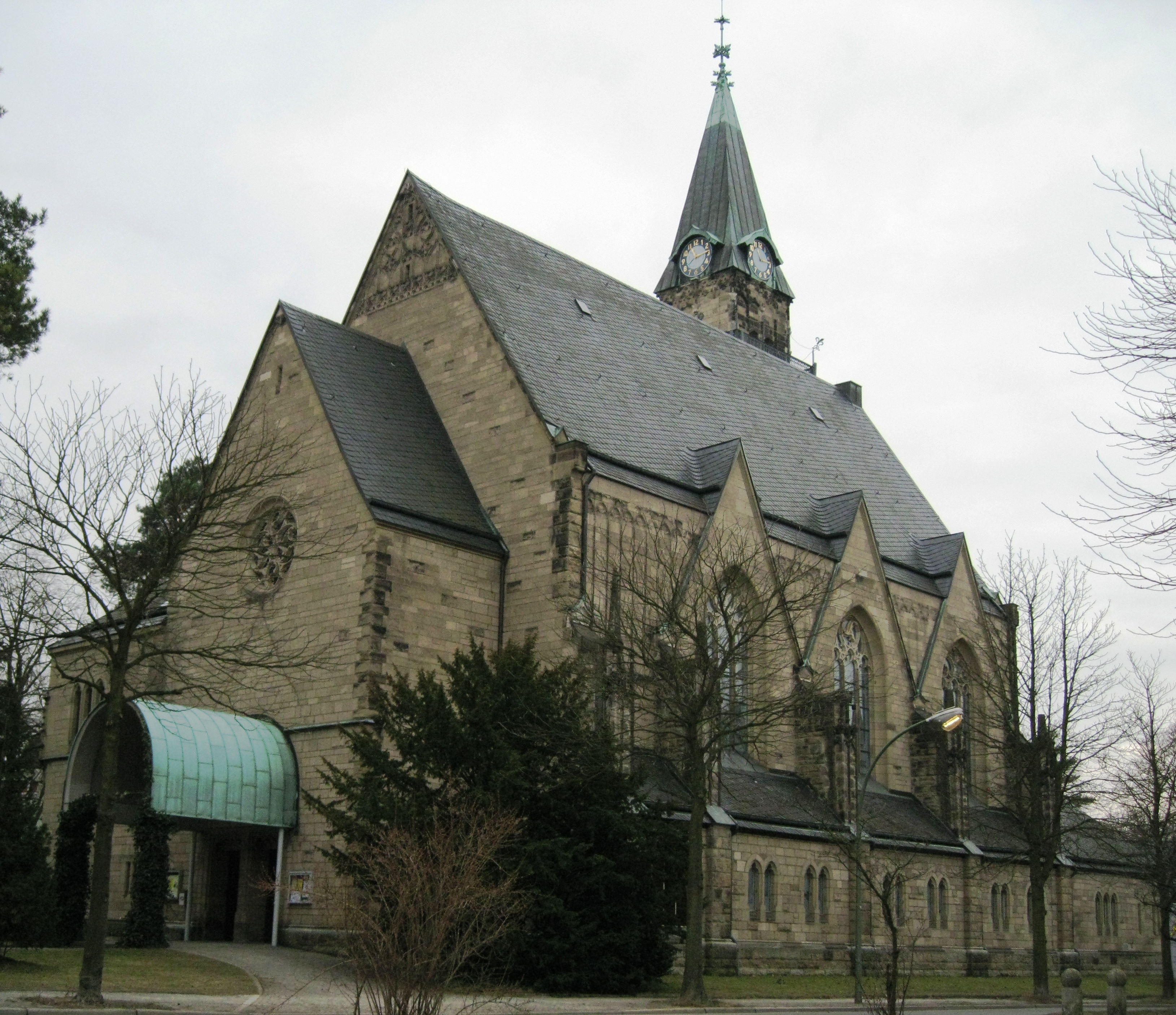 Grunewaldkirche Berlin von Norden aus fotografiert